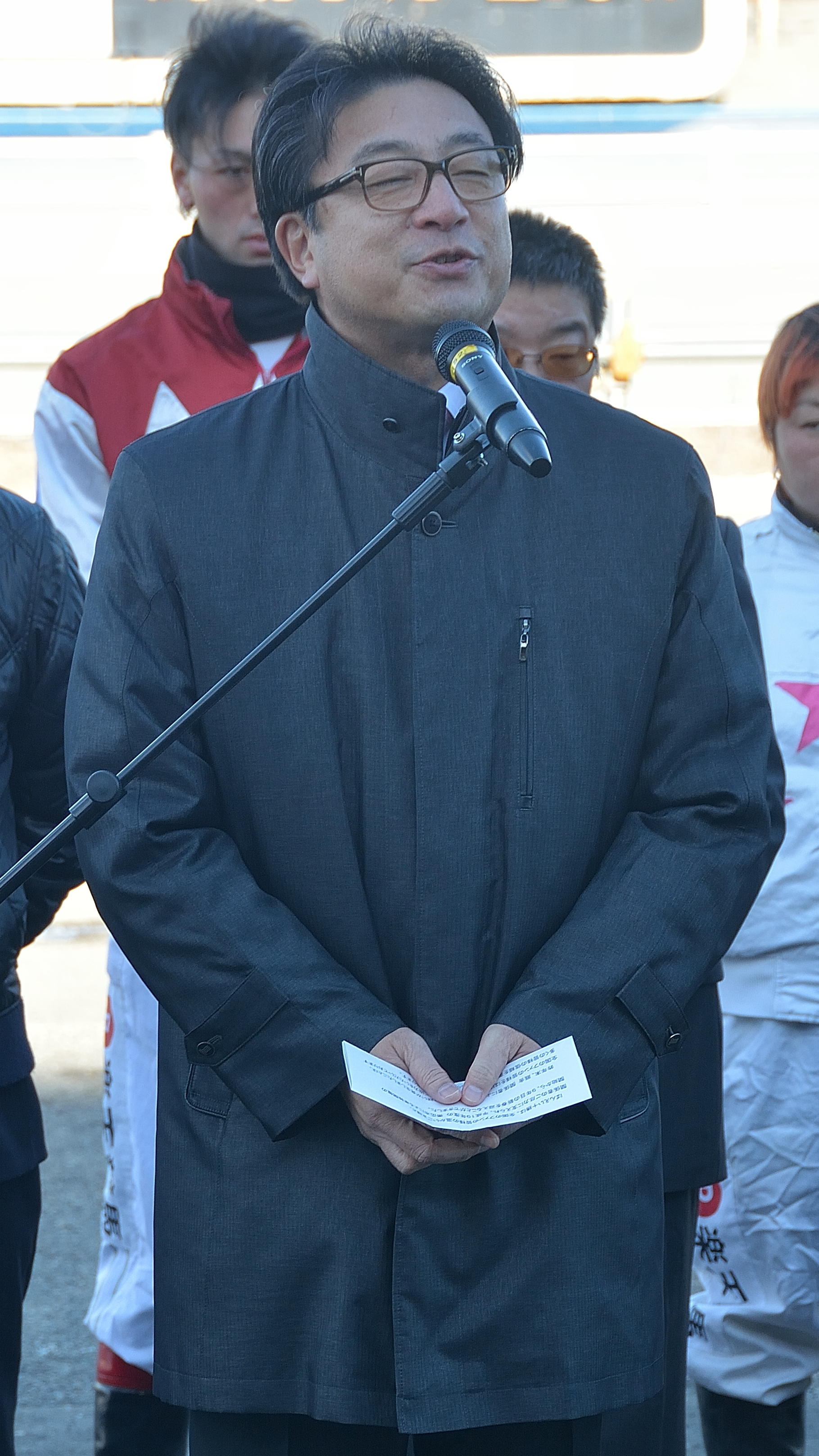 2016年1月1日に帯広競馬場の「エキサイティングゾーン」で、元日のイベントとして第1競走の直前に2016年の年頭挨拶を行っている帯広市の米沢則寿市長を、観客席から撮影したもの。